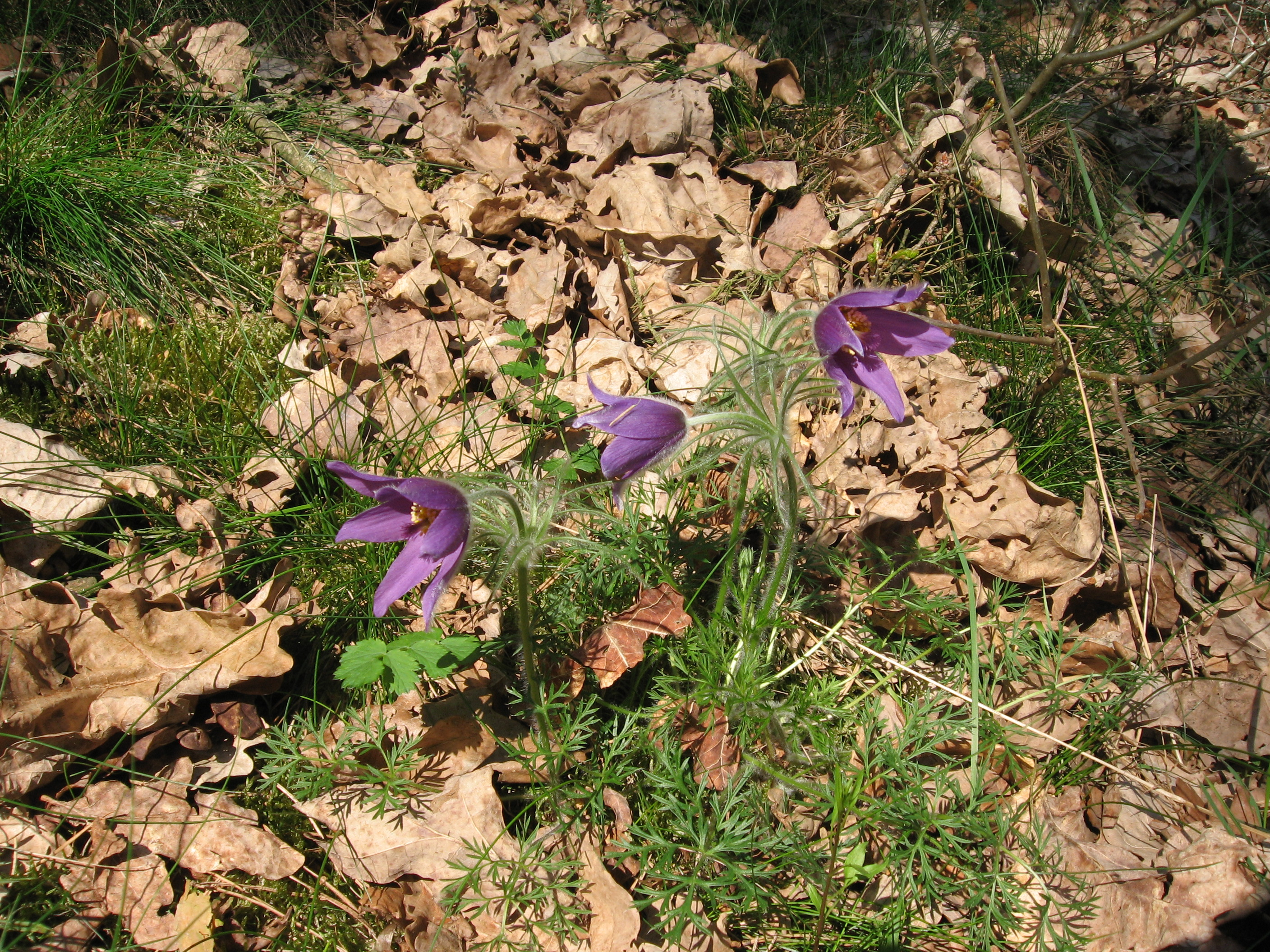 Kuhschellen auf dem Weinberg in Perleberg